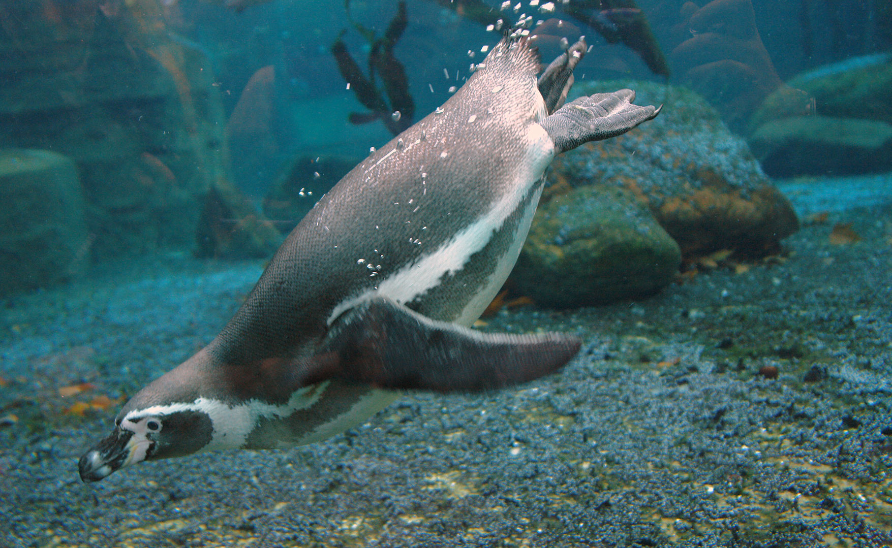 Tauchender Pinguin auf der Pinguinanlage im Dresdner Zooentstanden während des Linux-Info-Tag Zoo-Mapping